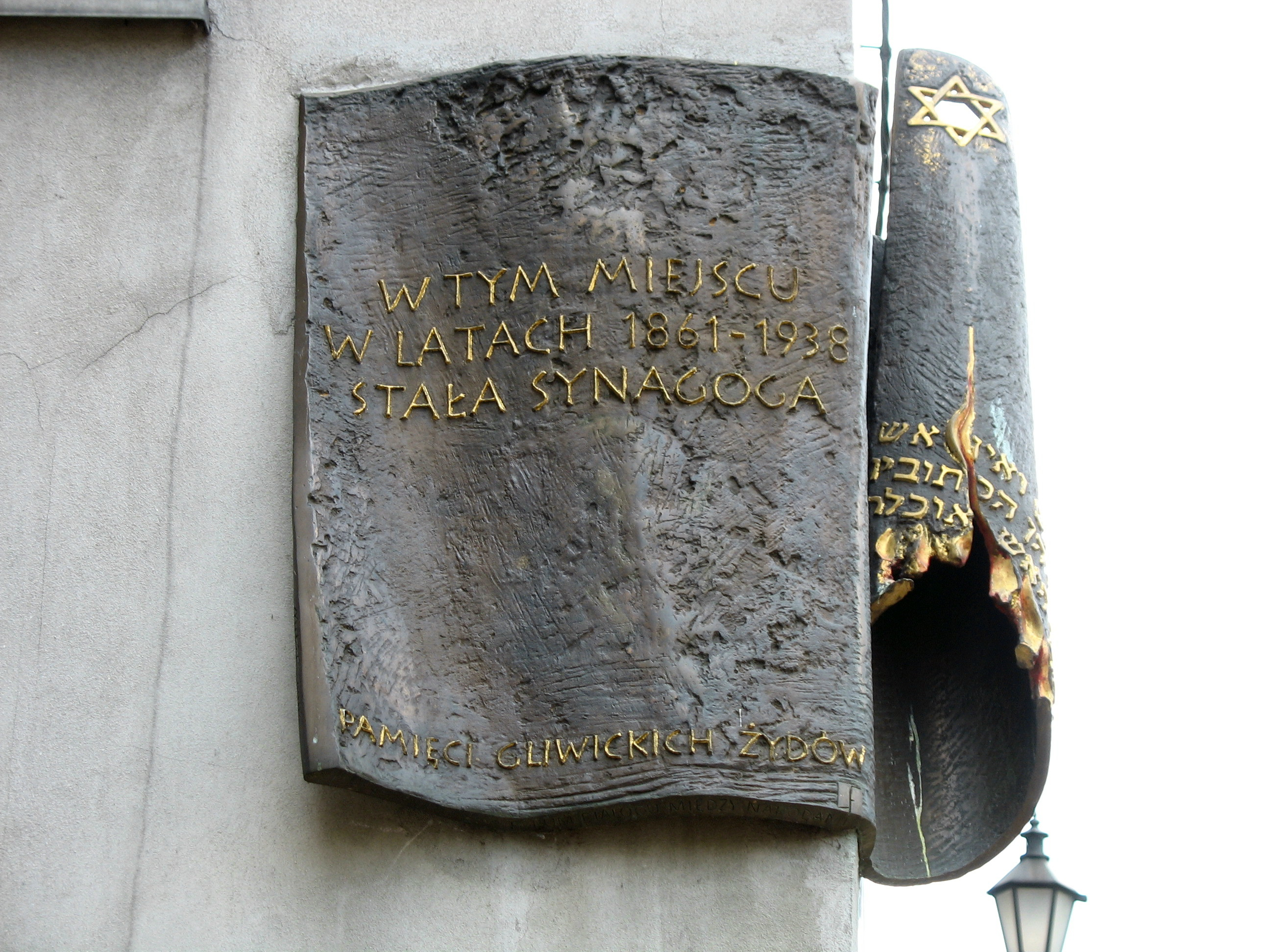 Tablica upamiętniająca Nową Synagogę w Gliwicach